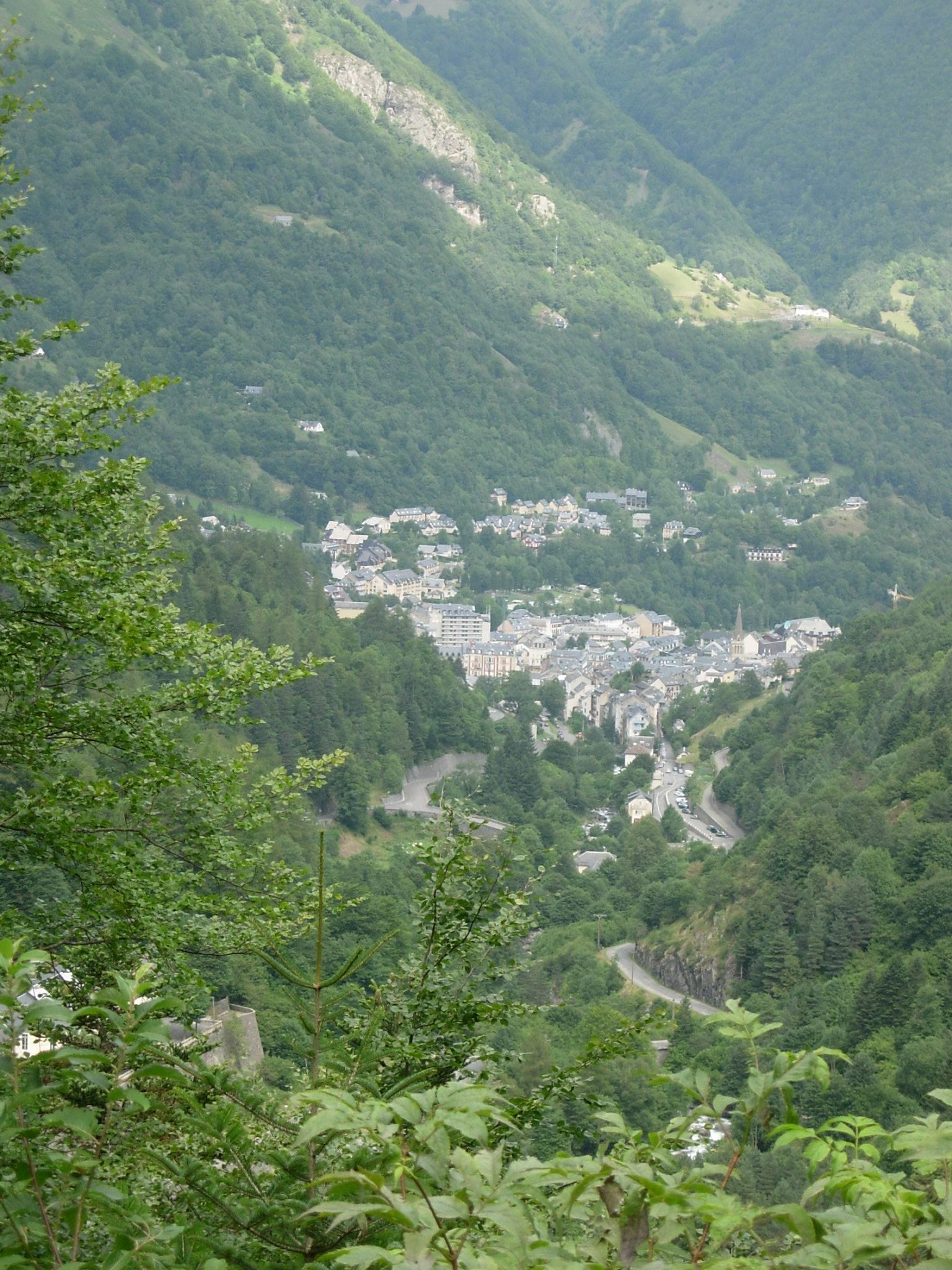 Photo personnelle, août 2005.